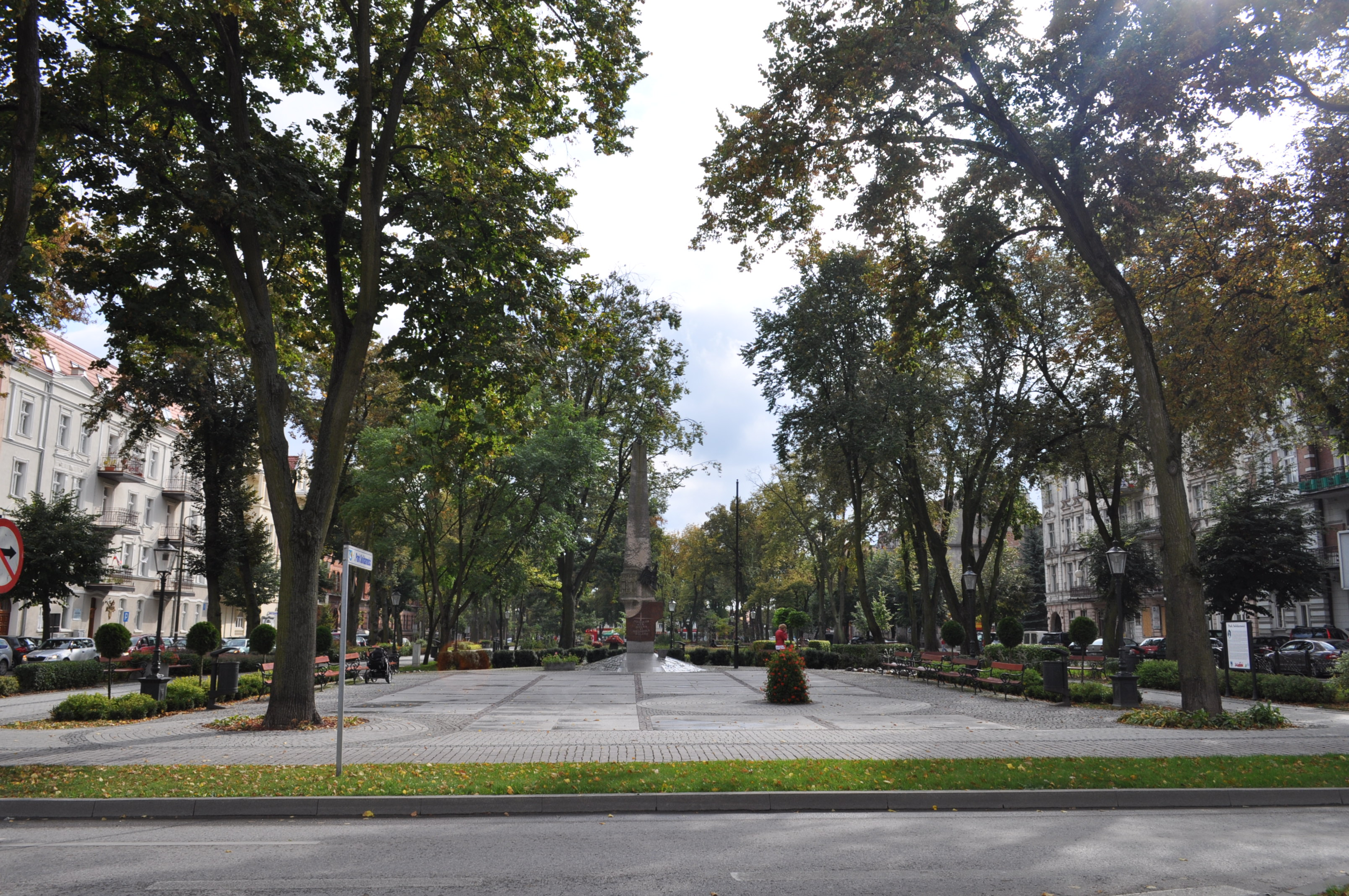 park miejski, położony między ulicami Armii Krajowej, 3 maja, Mickiewicza i Małeckich. Widok od strony ul. Mickiewicza